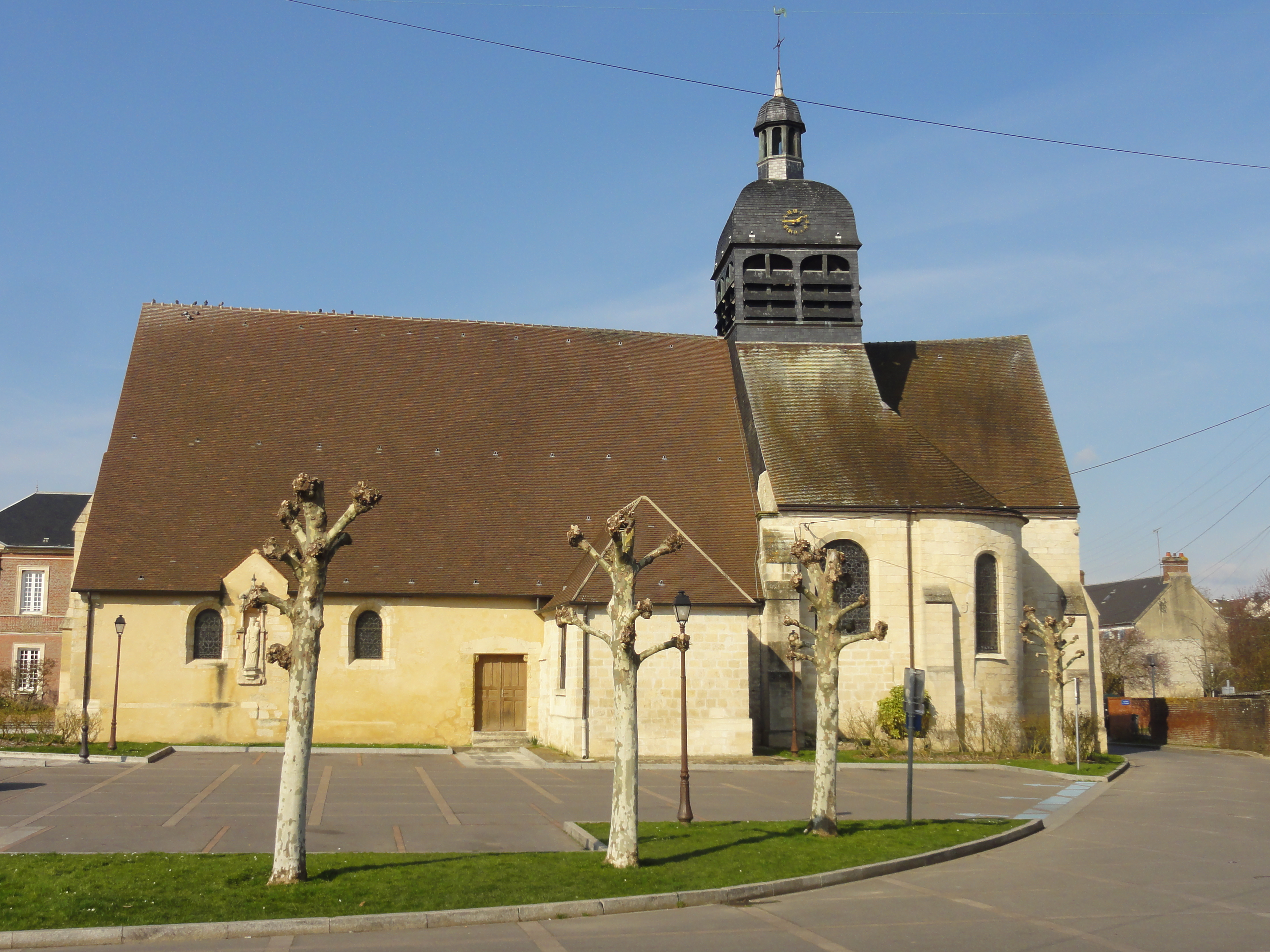 Église Saint-Denis de Bornel - voir titre.